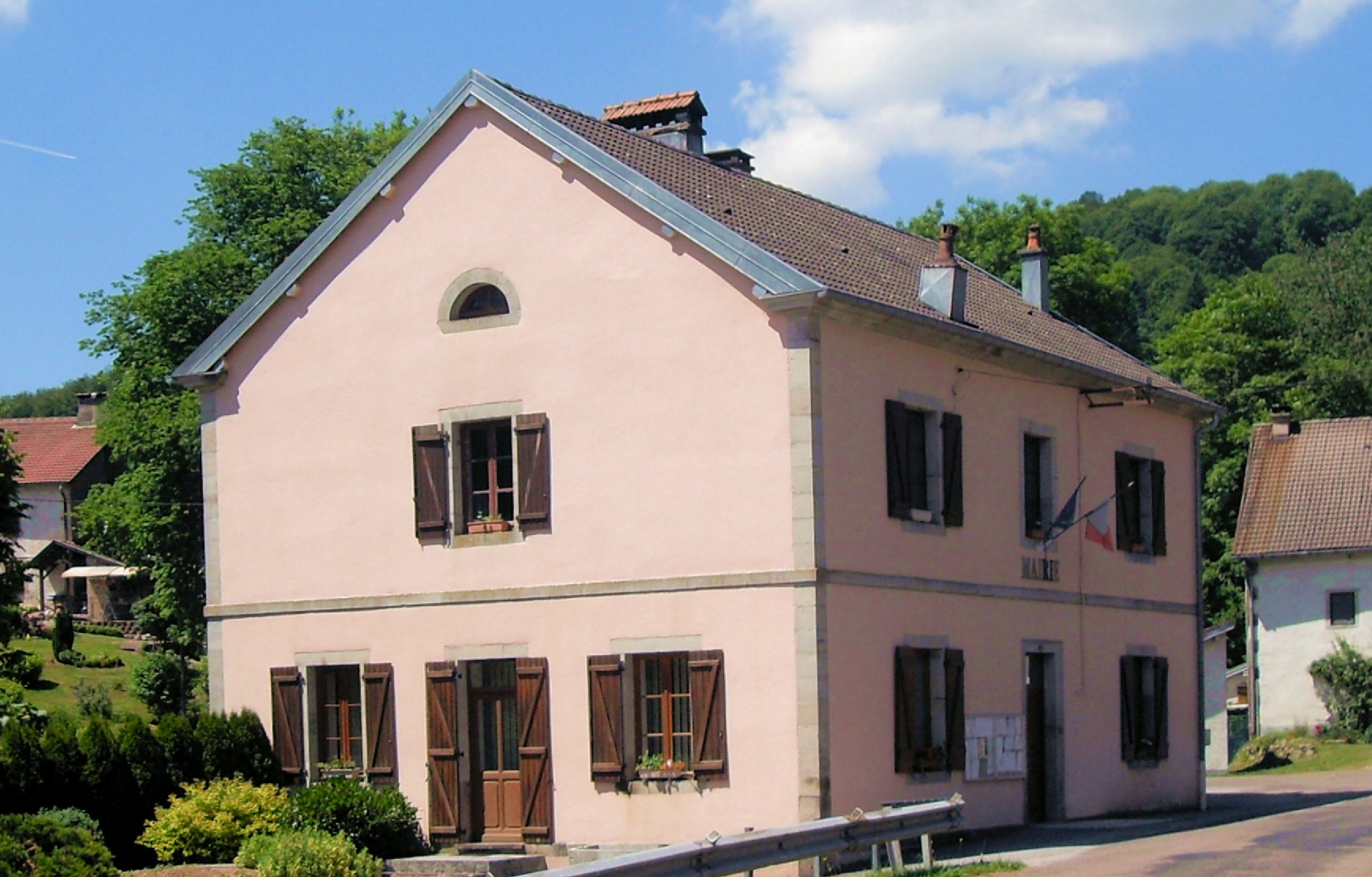 La mairie de Corravillers